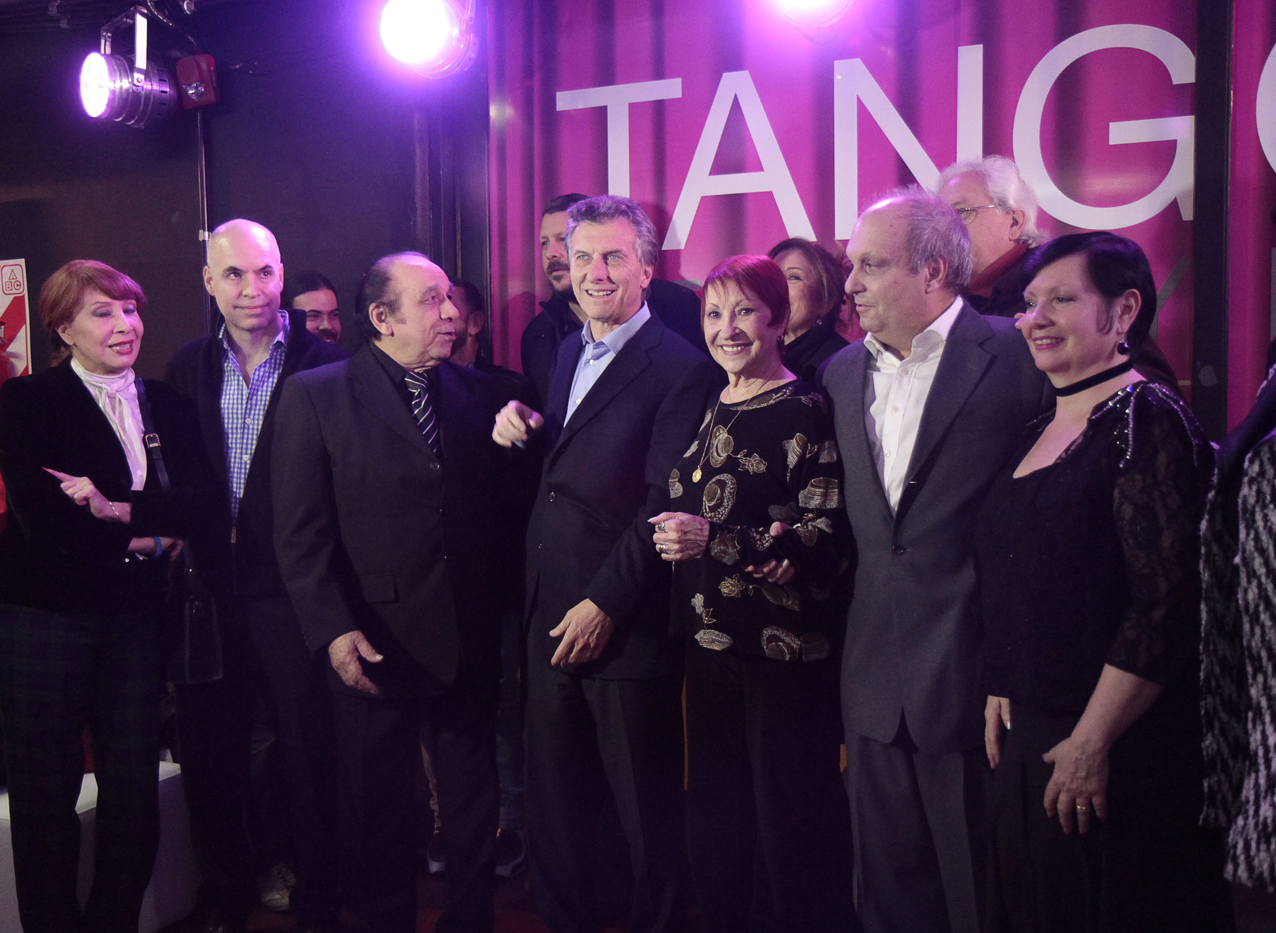 Buenos Aires. Agosto 14 de 2013. El jefe de Gobierno porteño, Mauricio Macri, asistió esta noche a la jornada inaugural de la edición 2013 del Tango Buenos Aires Festival y Mundial, organizado por el Ministerio de Cultura de la Ciudad de Buenos Aires, que se extenderá hasta el 27 de este mes. Foto: Nahuel Padrevecchi-np/GCBA